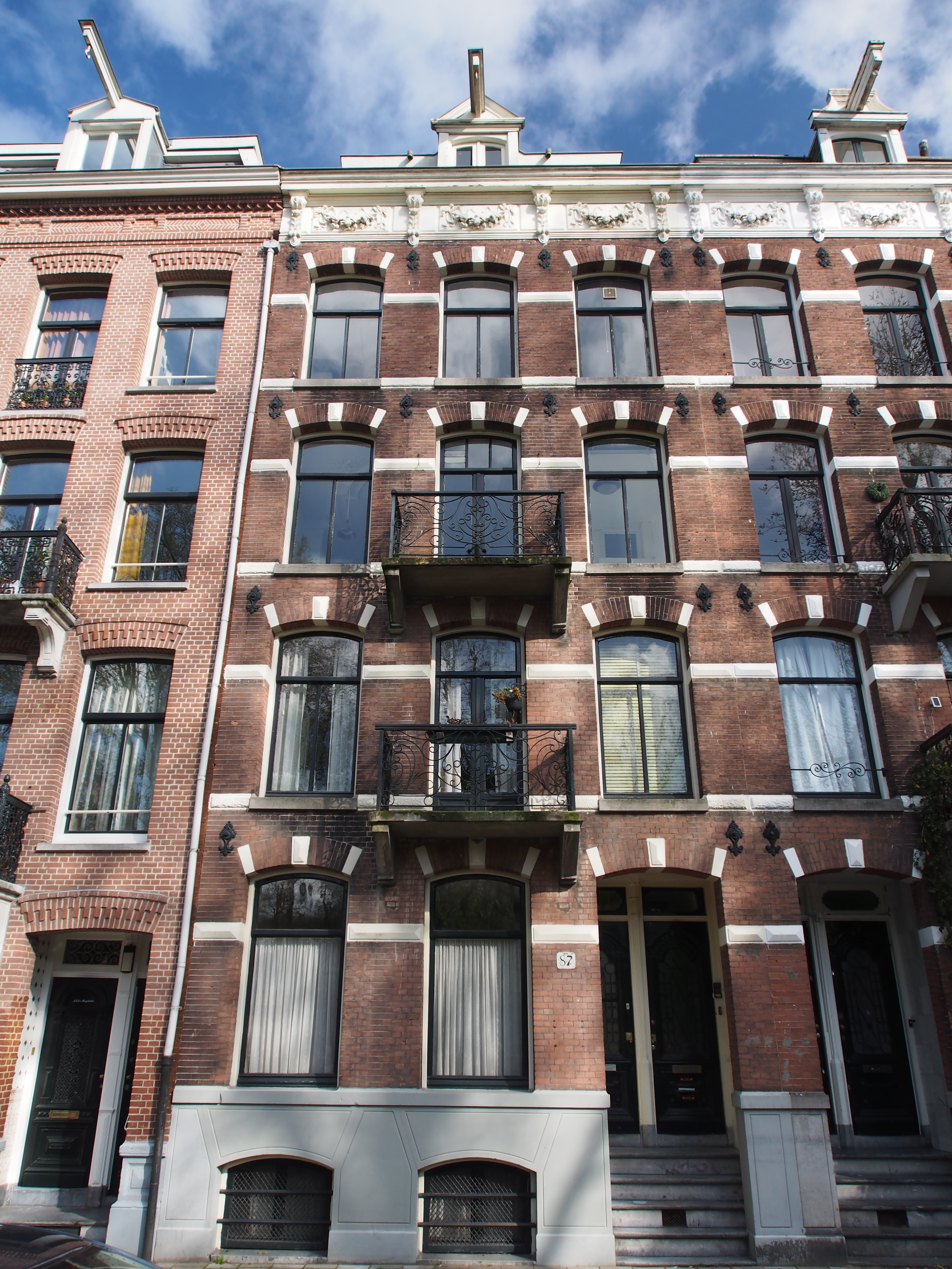 Monument in Amsterdam.